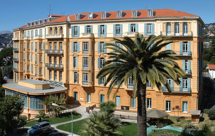 Centre Hospitalier Universitaire